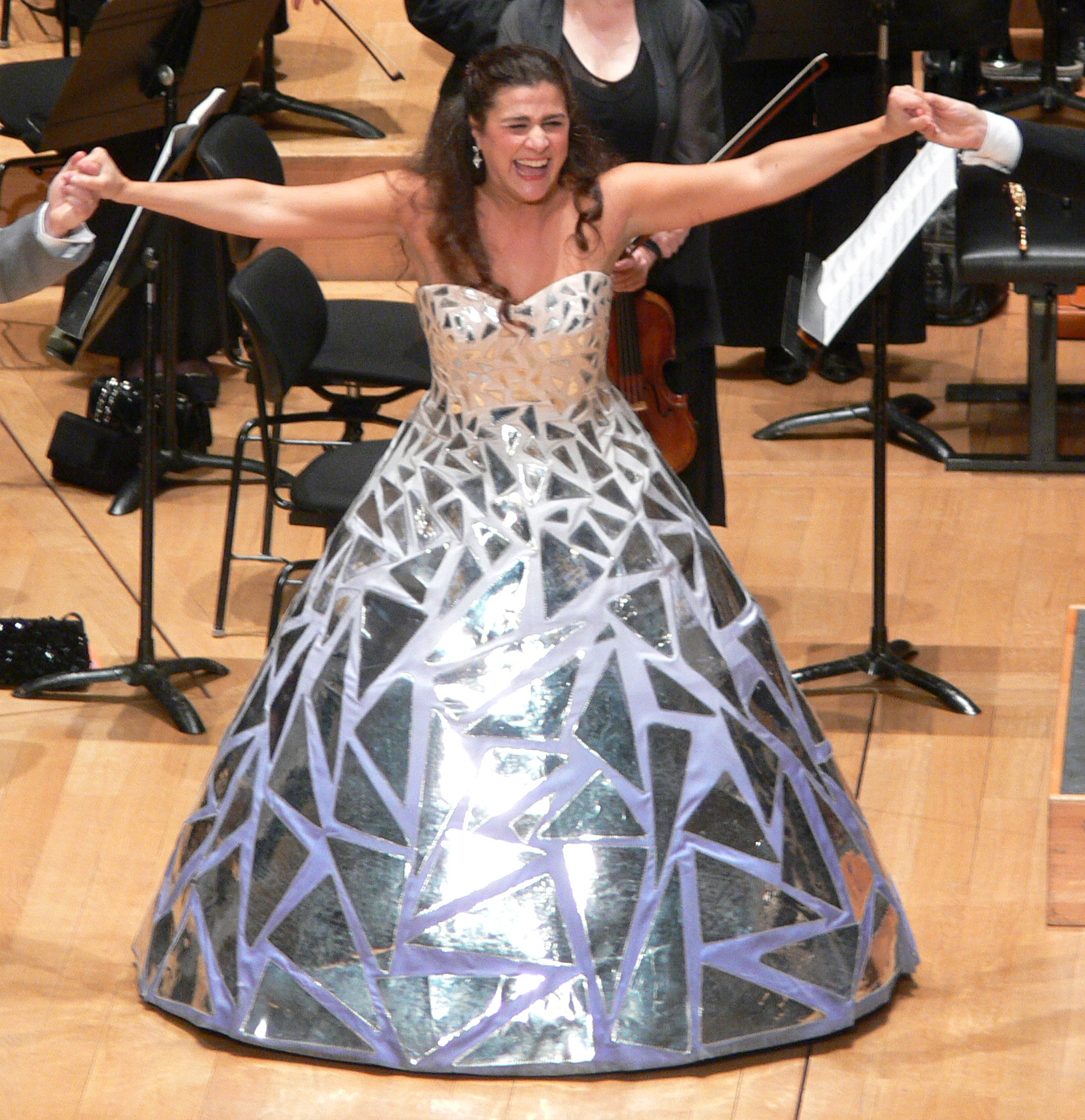 Cecilia Bartoli, after a concert performance of "La Cenerentola", Salle Pleyel, Paris